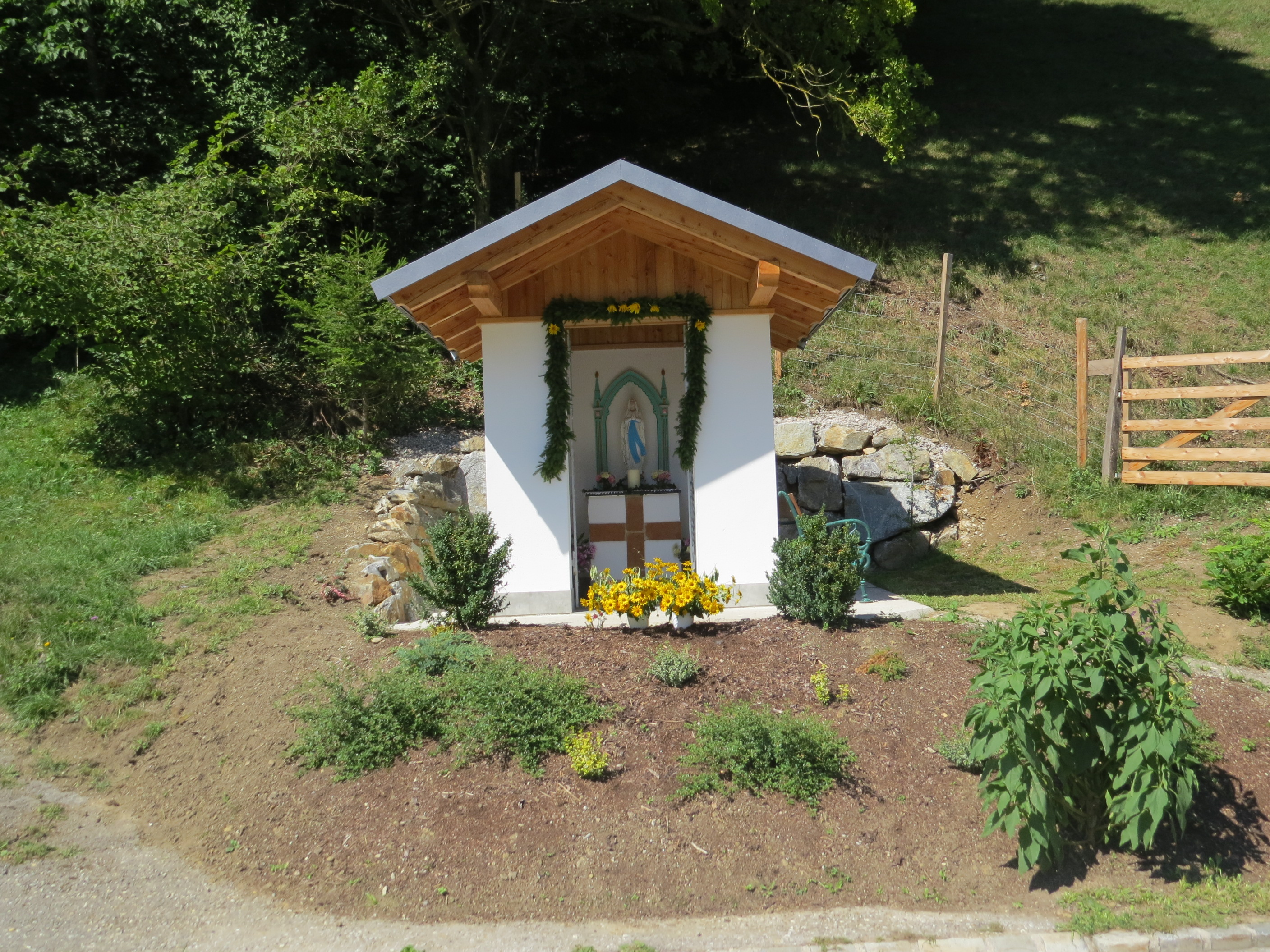 2017-08-15 Einsegung Kapelle Spiellaube (15)